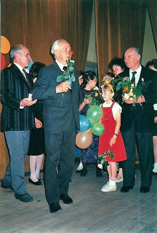 Wręczenie Orderu Uśmiechu. Pierwszy od lewej Franciszek Jaroszewski